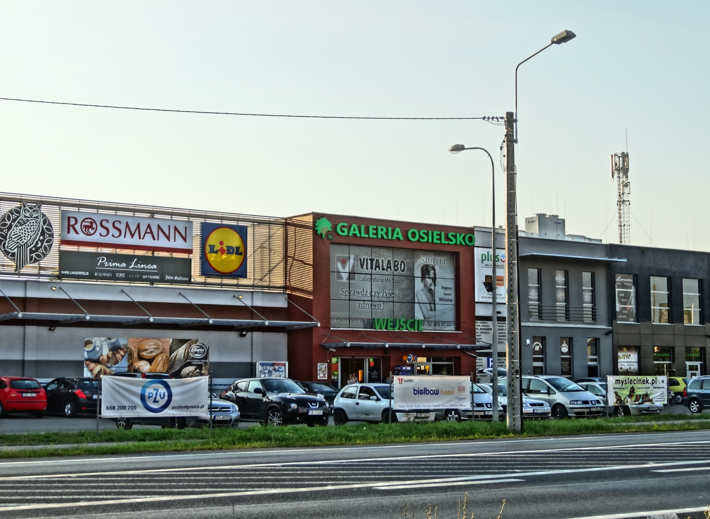 Galeria handlowa w Osielsku, gmina Osielsko, powiat bydgoski